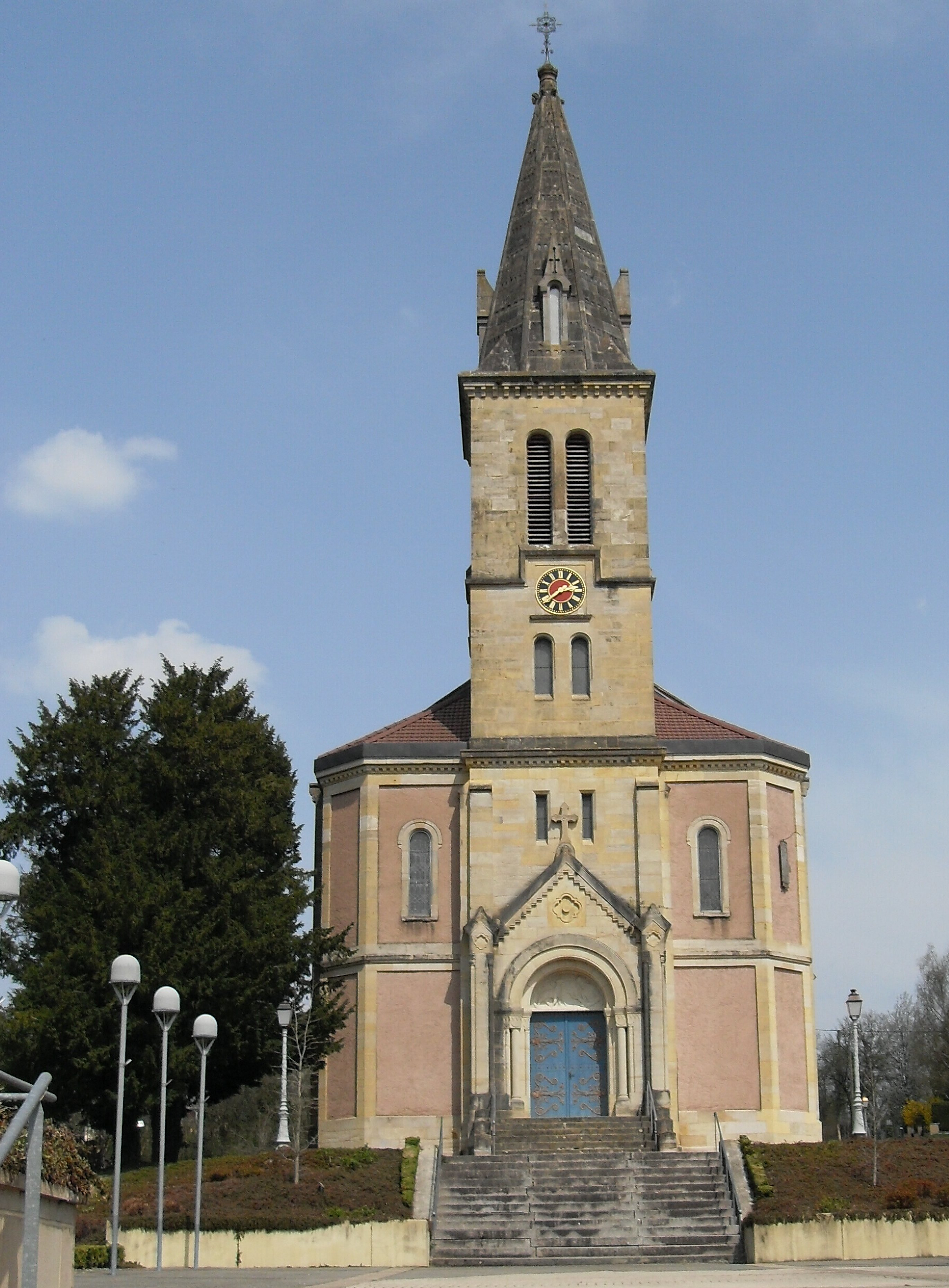 L'église paroissiale du Sacré-Cœur à Jettingen